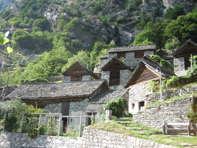 Brontallo TI